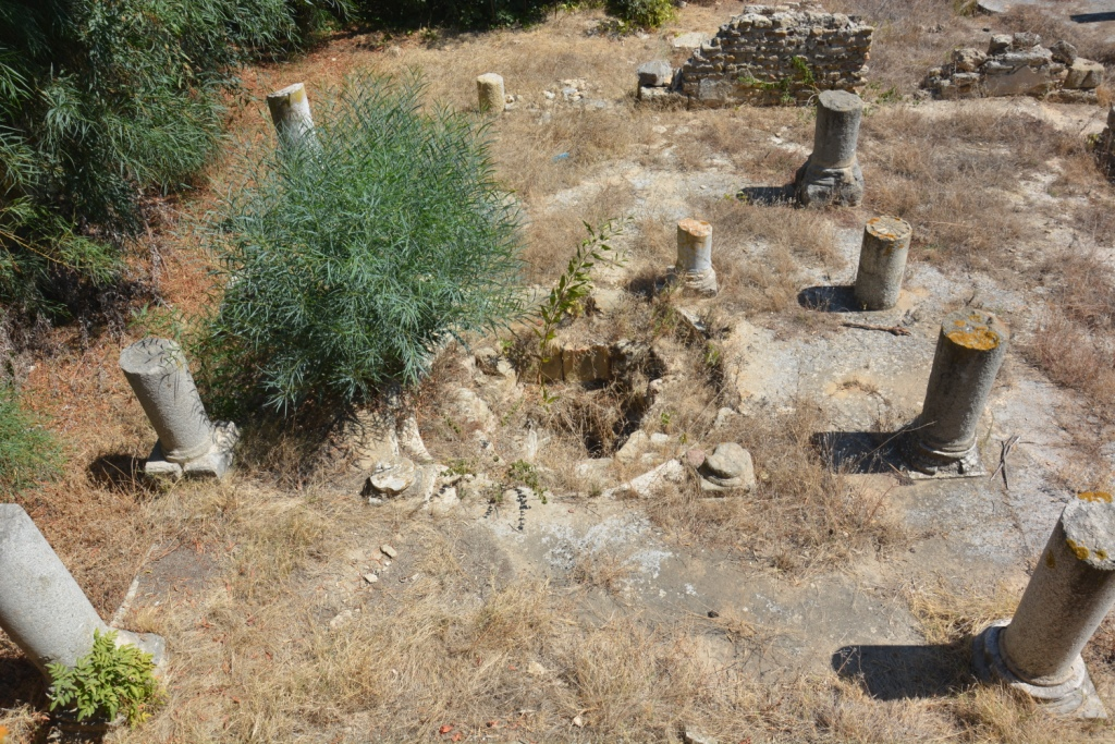 Basilique byzantine de Dermech (fouilles de 1899), Carthage